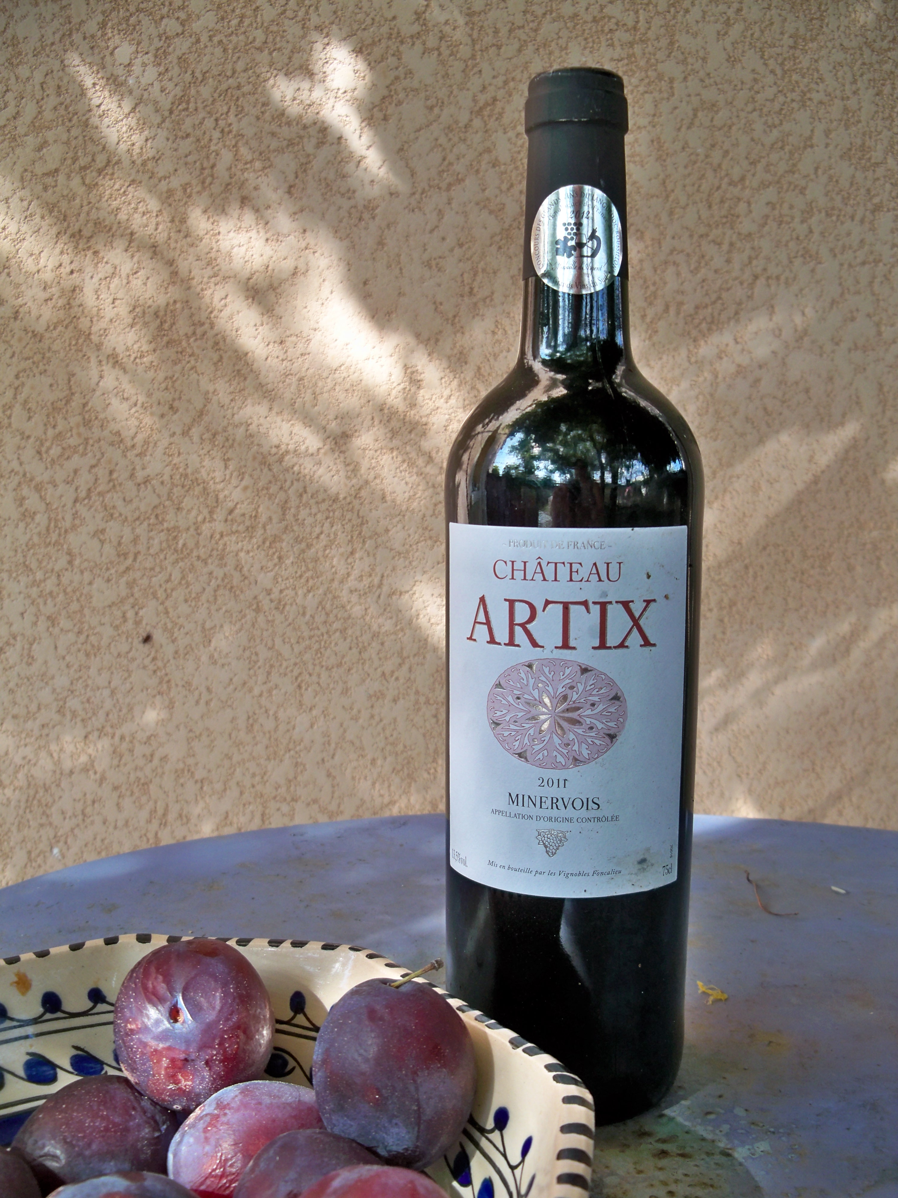 bouteille de Château Artix rouge 2011 - Minervois